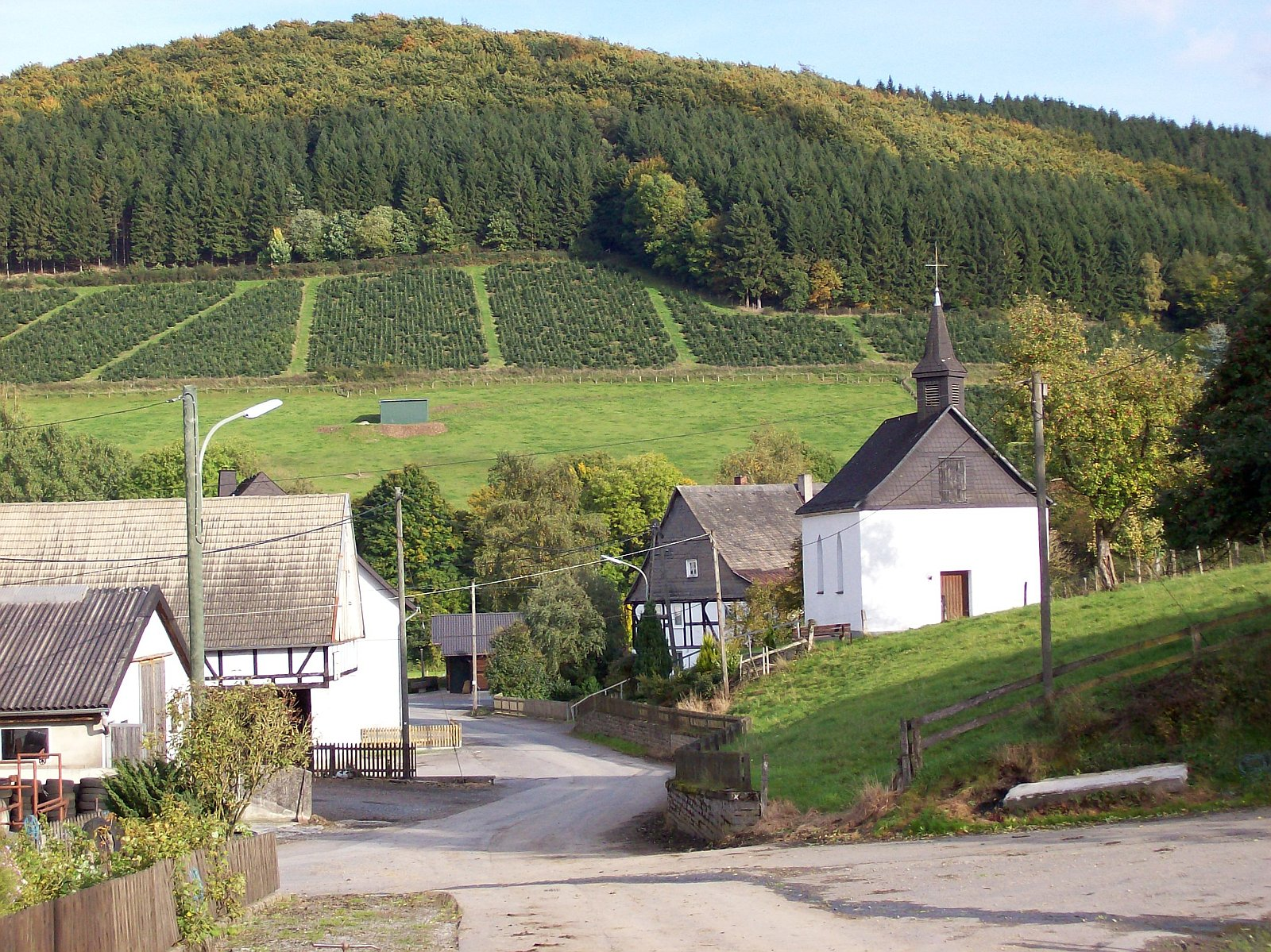 Schmallenberg-Grimminghausen (Germany)